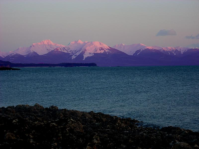 Auke Rec, Auke Bay Alaska